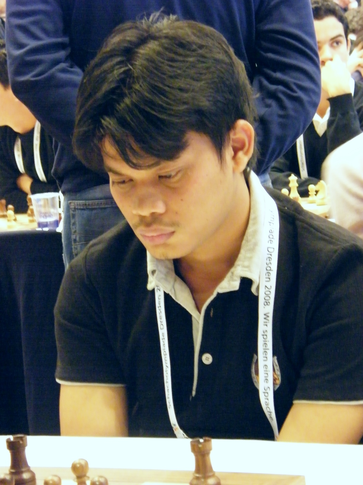 Susanto Megaranto bei der 38. Schacholympiade in Dresden 2008